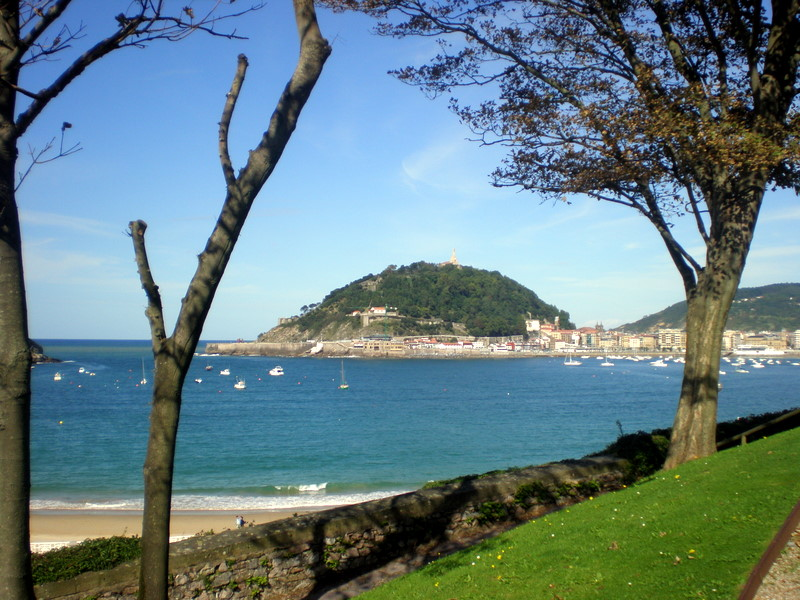 Jardines del Palacio Miramar, en San Sebastián (España)